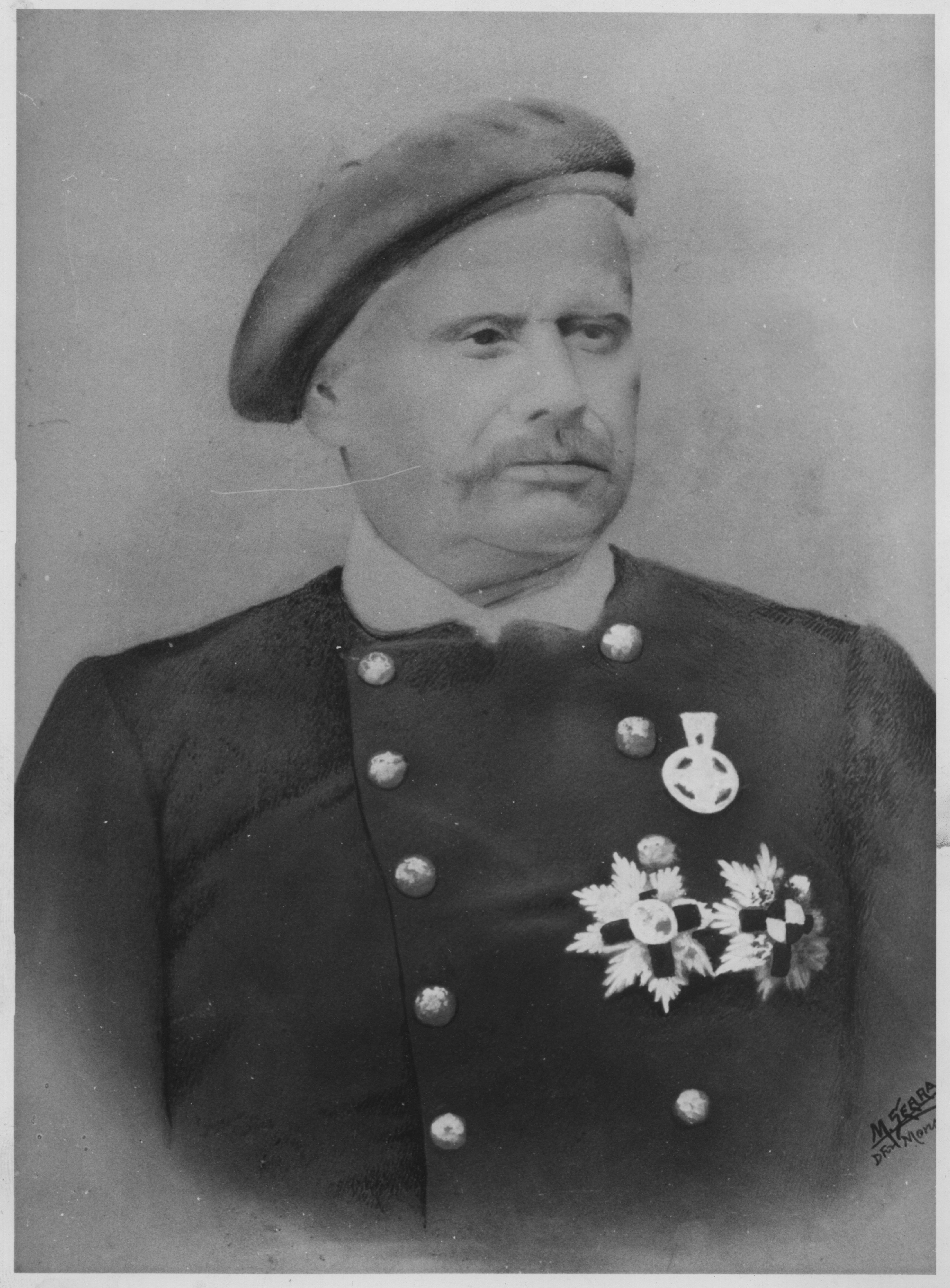 Pasqual Cucala Mir